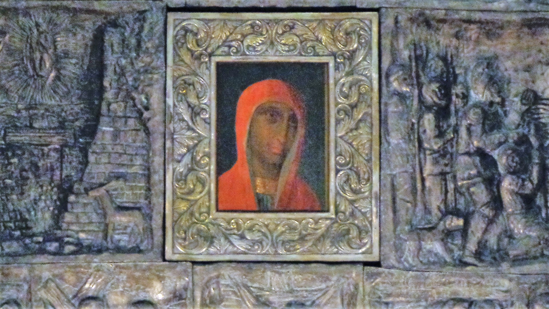 Vergine del Fileremo, dettaglio